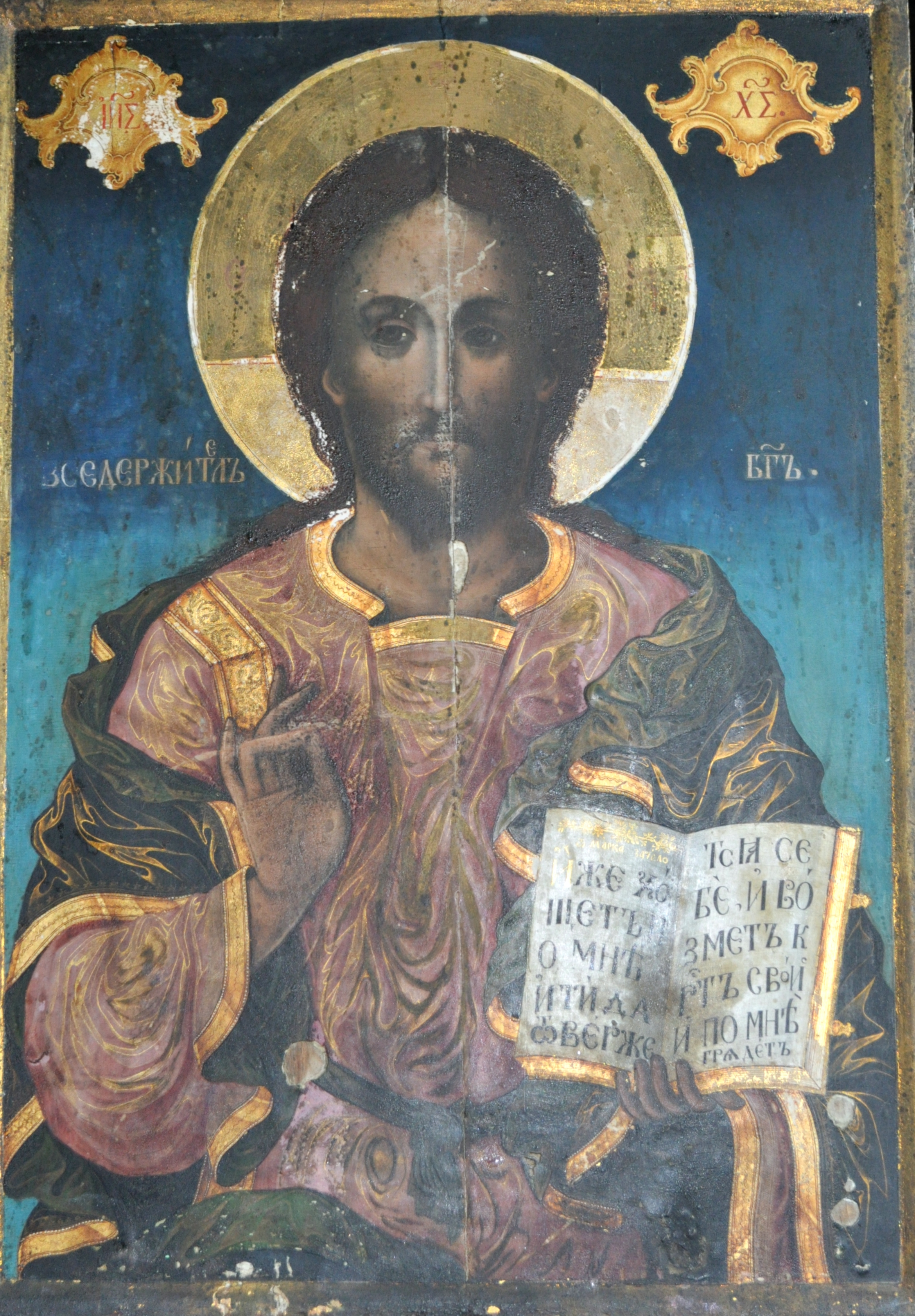 Mănăstirea Dălhăuți, Vrancea